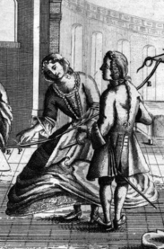 Ausschnitt aus Petrus Joannes Windler Tentamina de causa electricitatis (010)